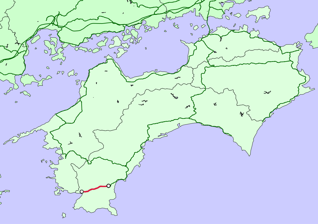 carte de la ligne Sukumo